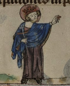 Eduard Vyznavač